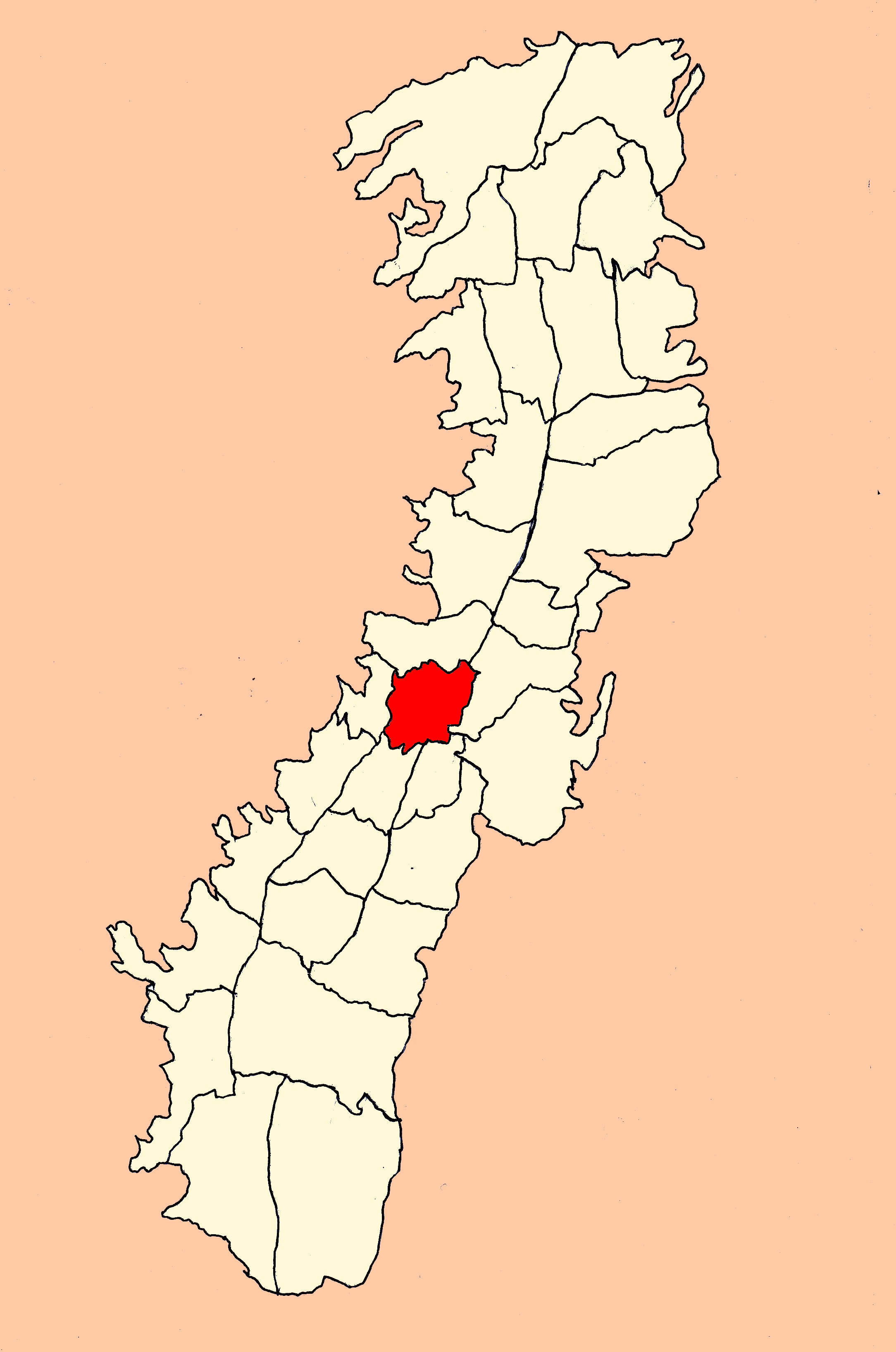 Parroquia Centro Histórico (Quito, Ecuador)